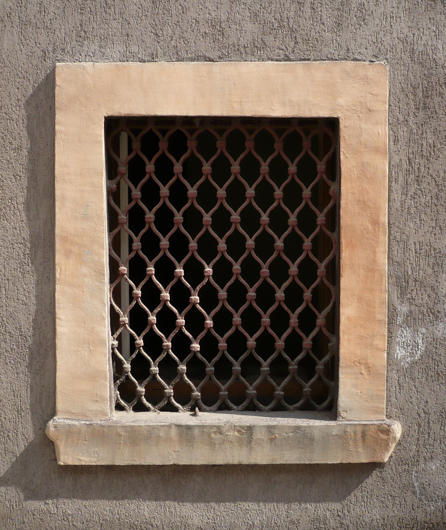 Nowa Ruda, ul. Piastów 21 - okno domu z przełomu XVIII i XIX w., przeb. w 1813 r. i w XX w. (zabytek nr A/947/1439/WŁ z 10.07.1995)